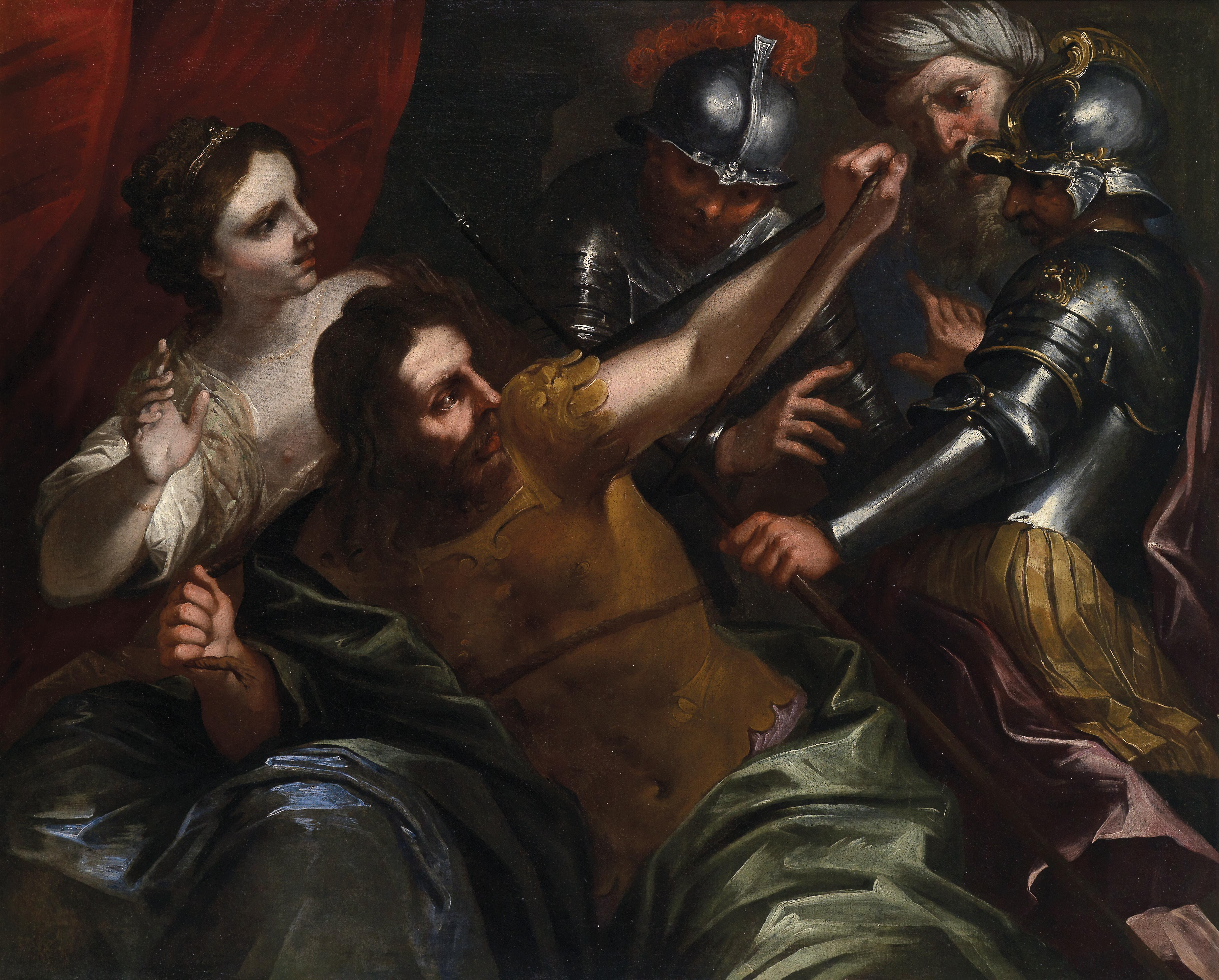 Samson und Delilah